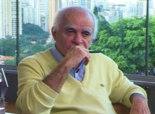 Ignácio de Loyola Lopes Brandão (Araraquara, 31 de julho de 1936) é um contista, romancista e jornalista brasileiro.